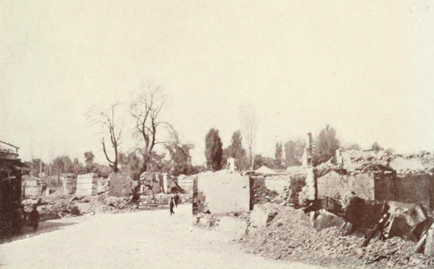 Vista de Seres, arrasada por los búlgaros en retirada durante la Segunda Guerra Balcánica.